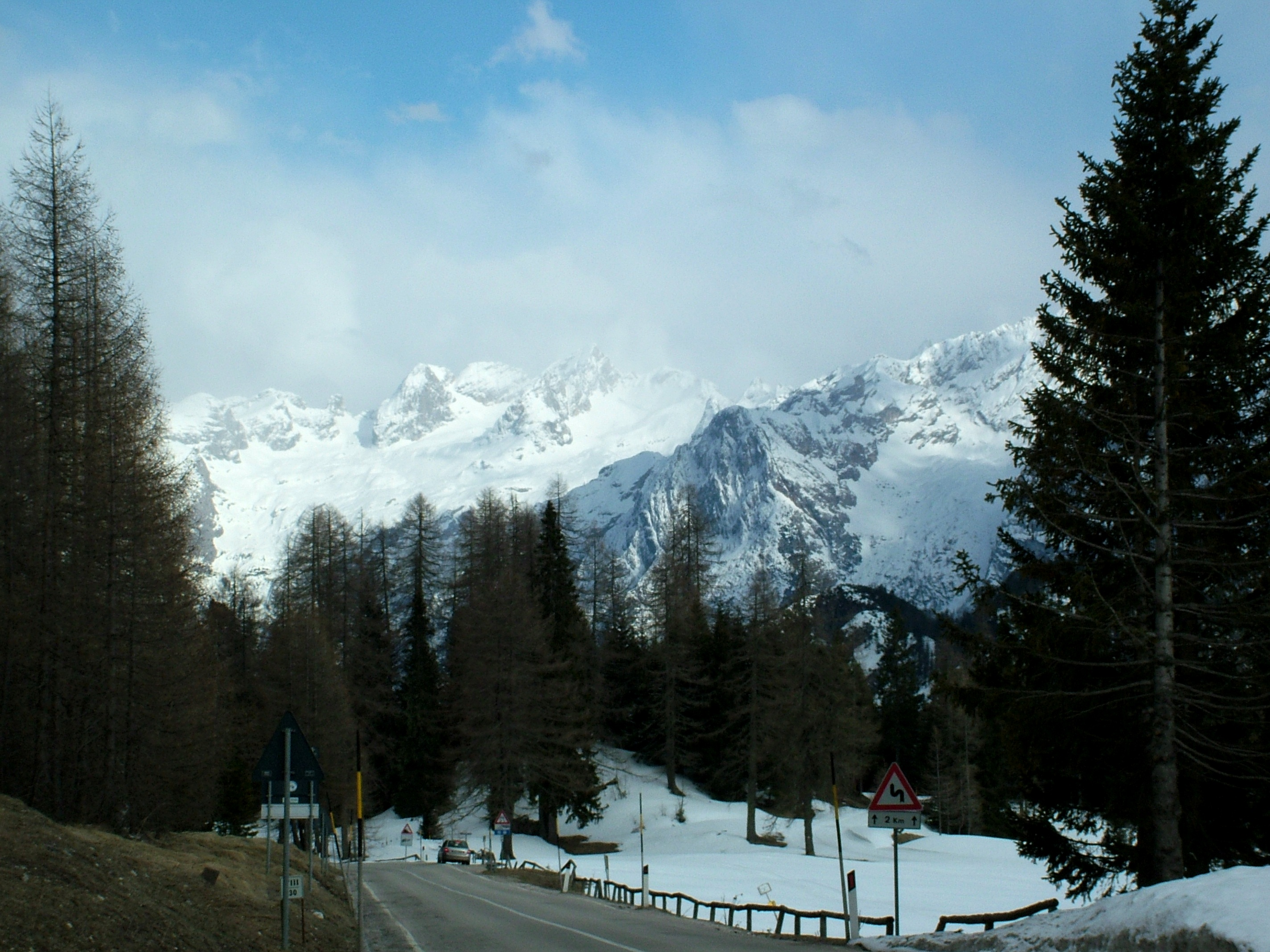 Passo Tre Croci: Dolomitok, háttérben a Sorapis (Olaszország)